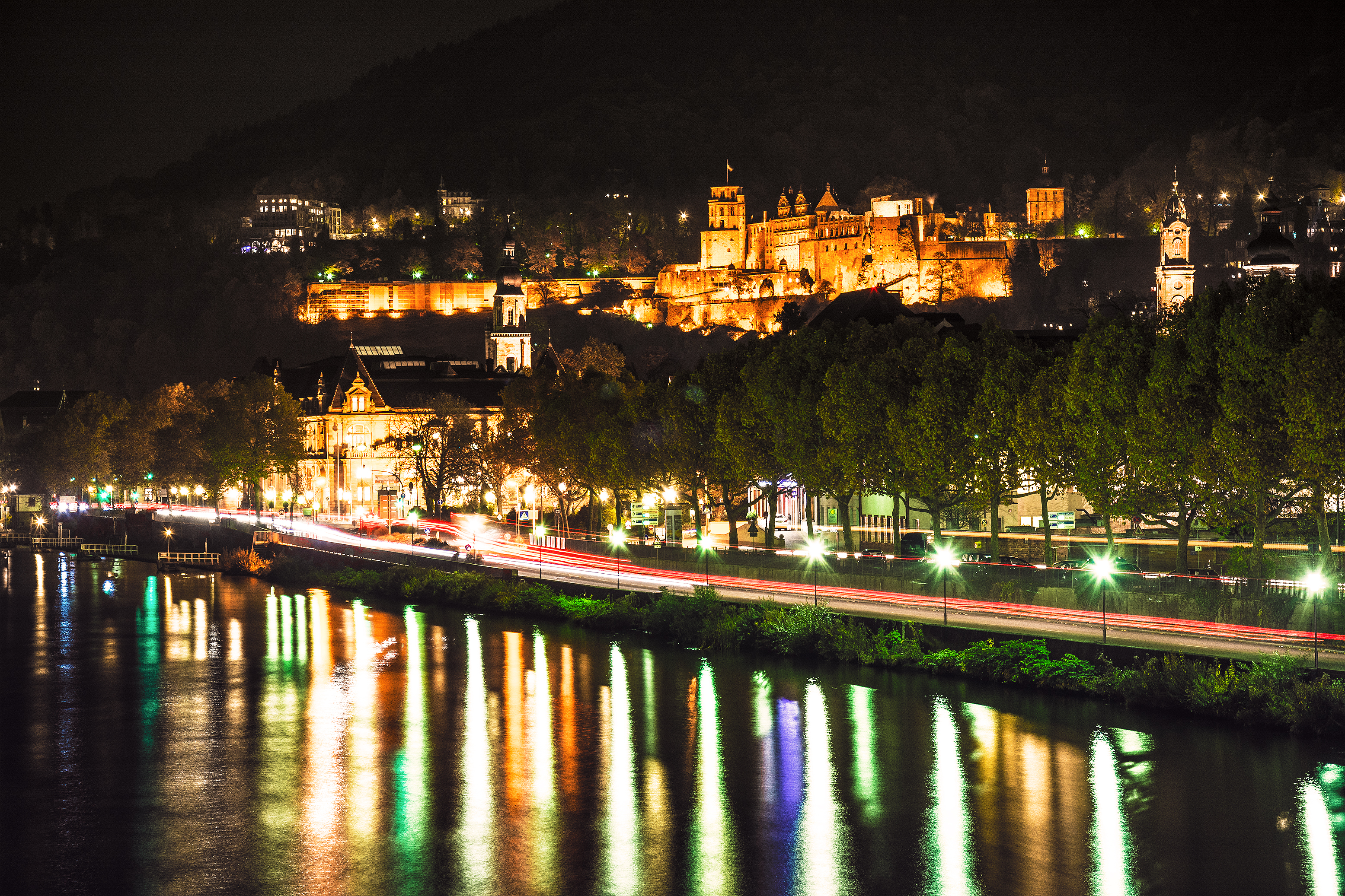 Schloss Heidelberg bei Nacht